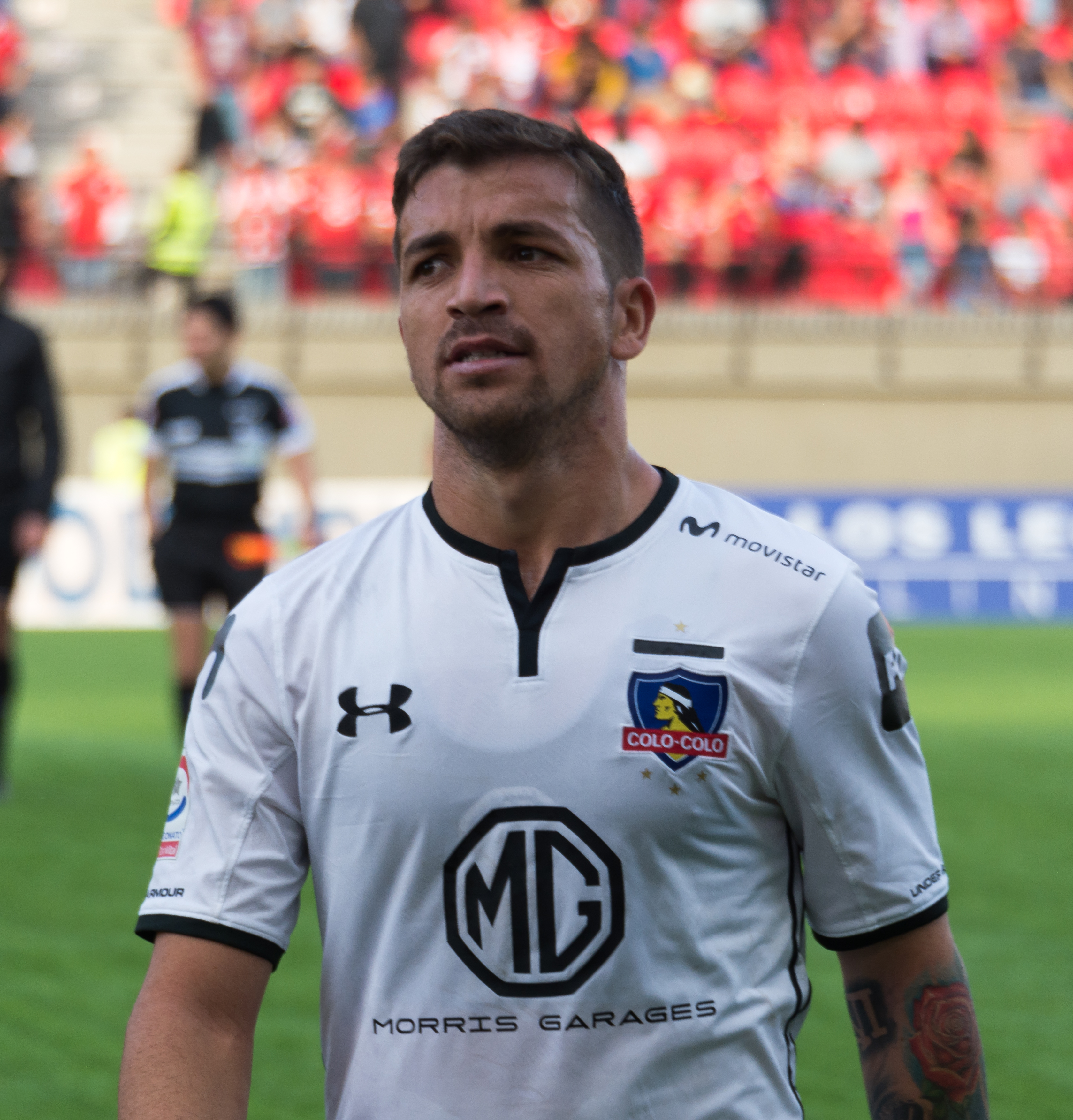 Gabriel Costa Heredia, Unión La Calera v Colo-Colo, Estadio Municipal Nicolás Chahúan Nazar, La Calera, Región de Valparaíso, Chile.